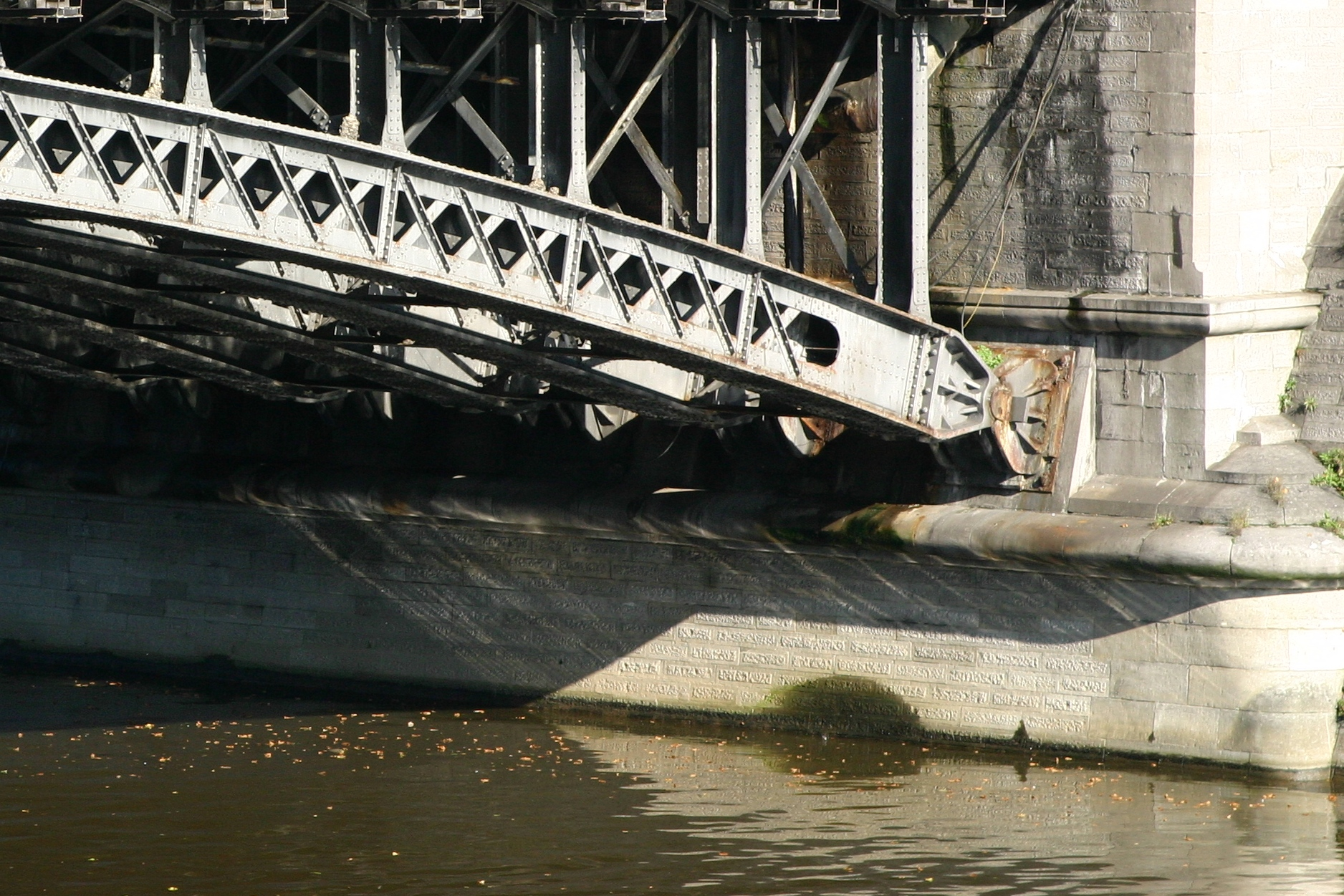 Pont de Fetinne rietst Widderlager.